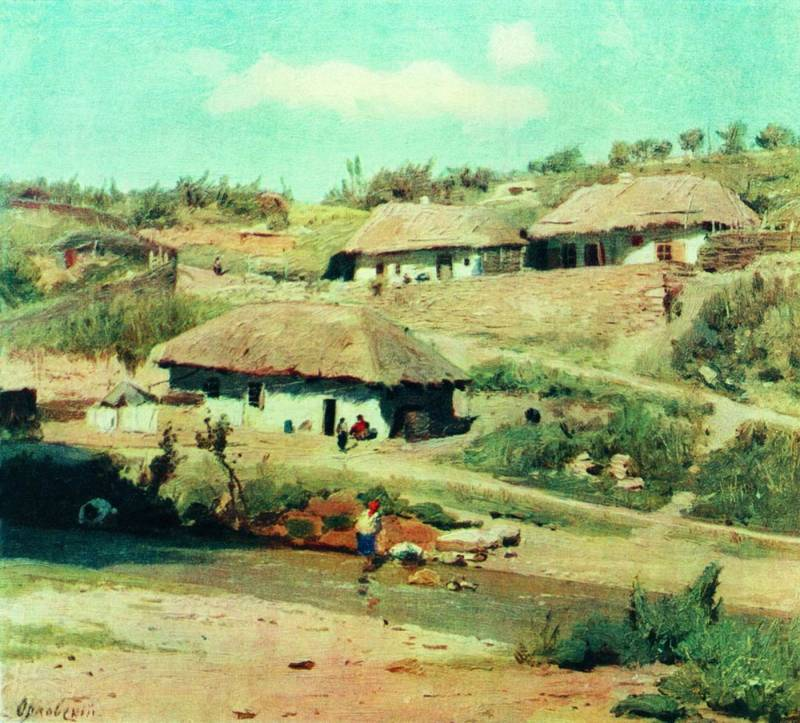 Houses in summer day.label QS:Lru,"Хаты в летний день. 1870-е гг. Киевский музей украинского искусства." label QS:Len,"Houses in summer day."